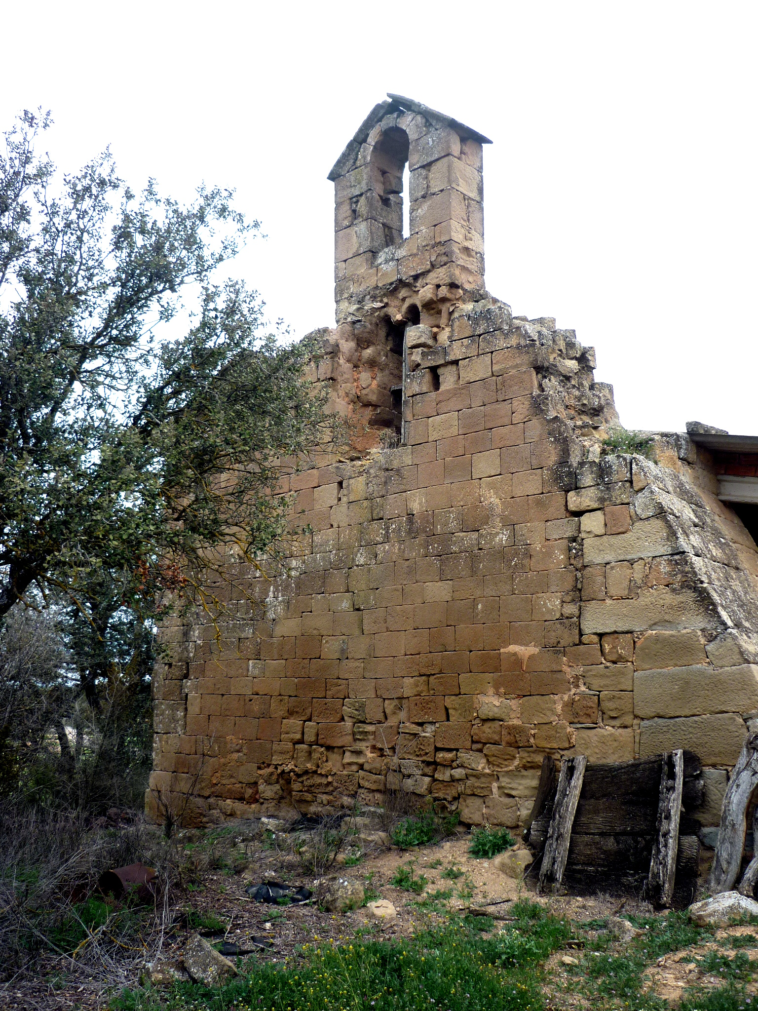 Masia Llorenç de Florejacs (Torrefeta i Florejacs): capella de Sant Sebastià